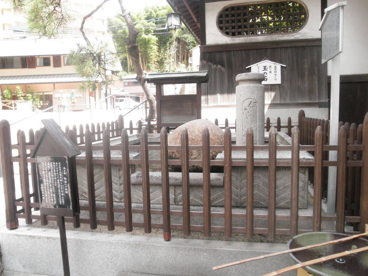 道後温泉（2010年9月6日）